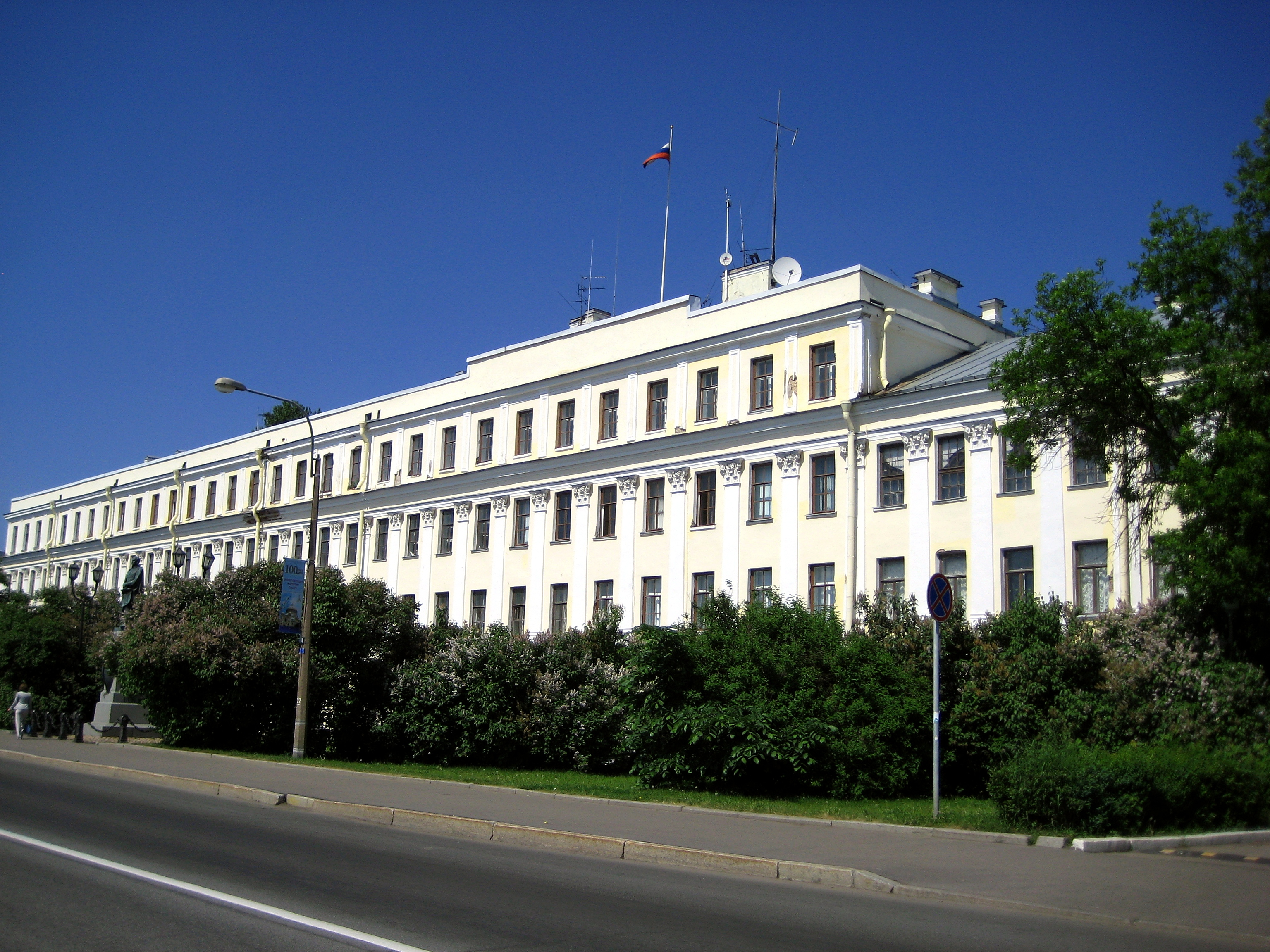 Итальянский дворец (Санкт-Петербург, Кронштадт, Макаровская улица, 3)